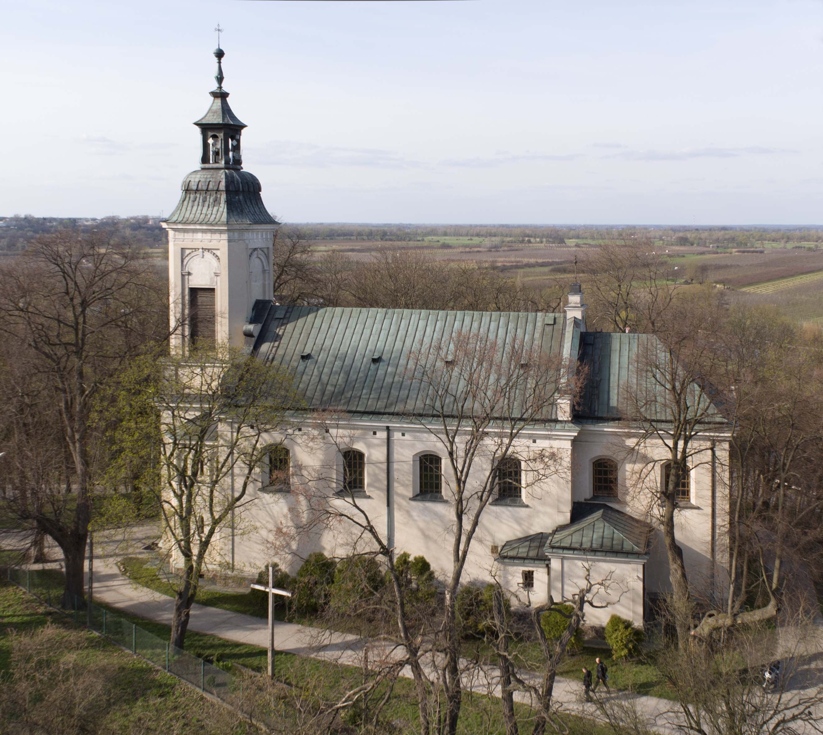 Kościół pw. Przemienienia Pańskiego w Czersku (woj. mazowieckie)